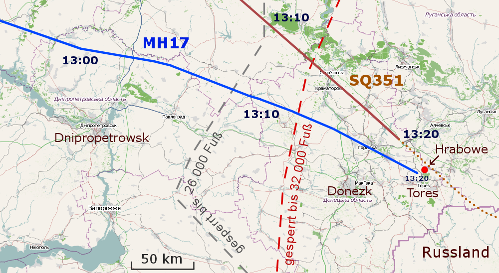 Route von Malaysia-Airlines-Flug 17 am 17. Juli 2014 von 12:55 bis 13:20 UTC und Singapore-Airlines-Flug 351 von 13:08 bis 13:27 UTC, Daten von Flightradar24 (MH17, SQ351), Karte von OpenStreetMap; Luftraumsperrzonen gemäß NOTAM A1383/14 und A1492/14 This map may be incomplete, and may contain errors. Don't rely solely on it for navigation.